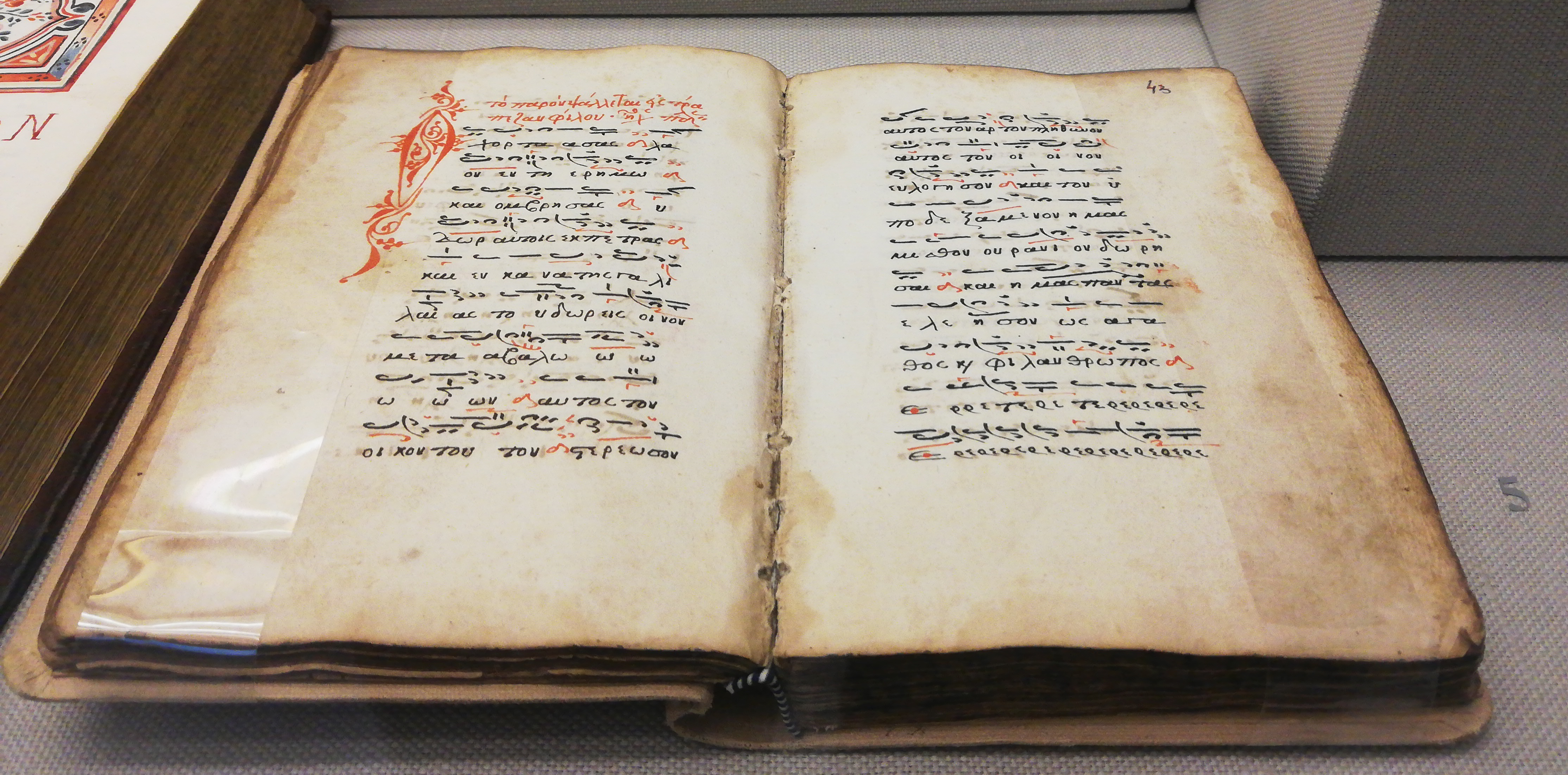 Manuscrit musical avec des canons sacrés et des mégalynaria (hymnes), par le moine-prêtre Anthimos du monastère Pantokratoros sur le mont Athos. XVIe siècle.